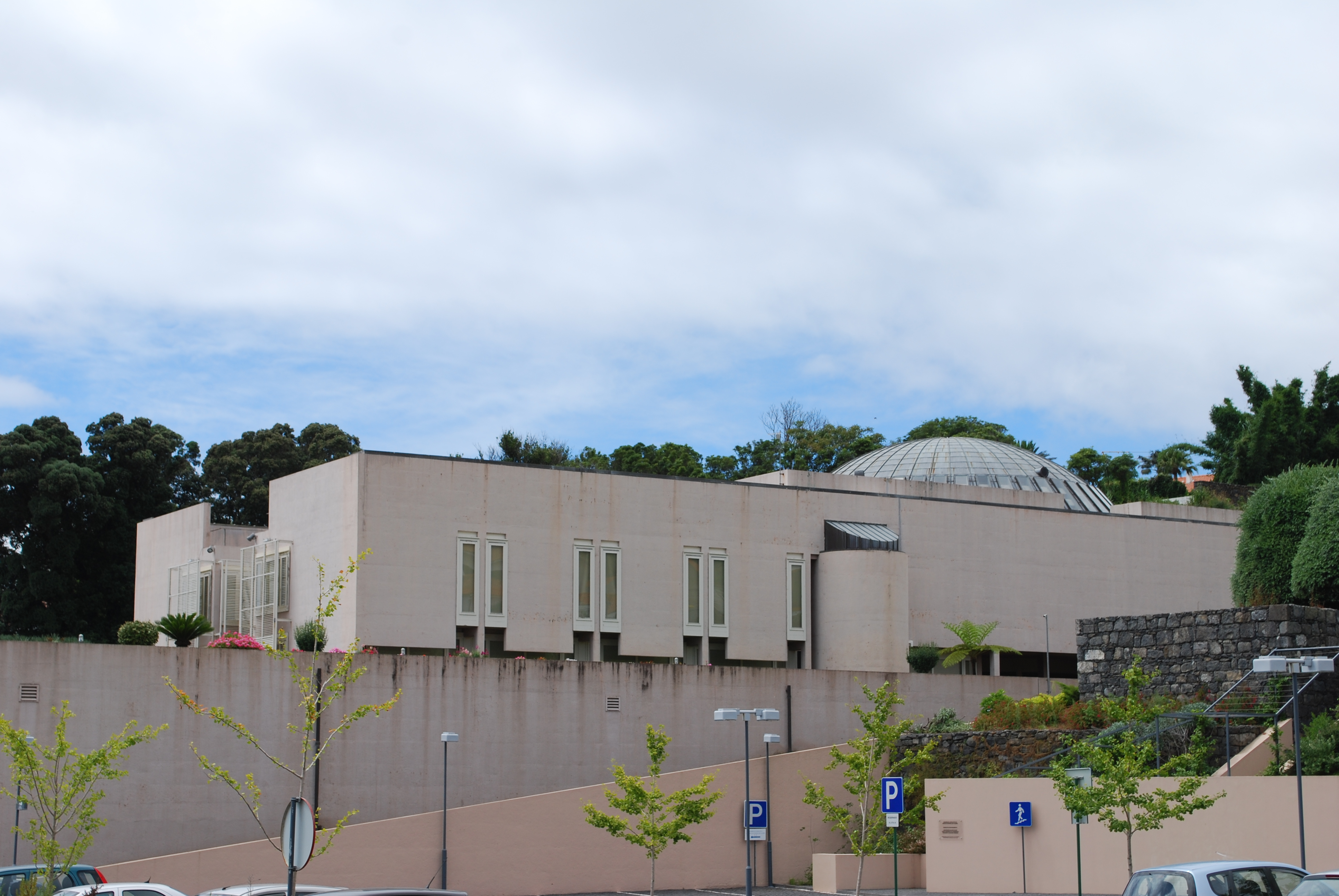 Edifício sede da Assembleia Legislativa Regional dos Açores